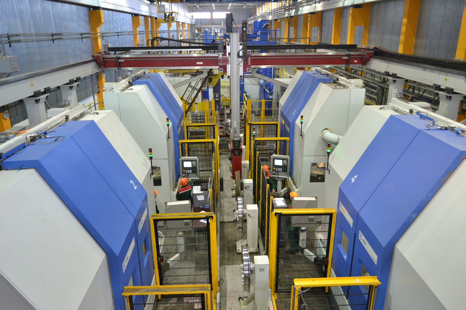 Проммашкомплект